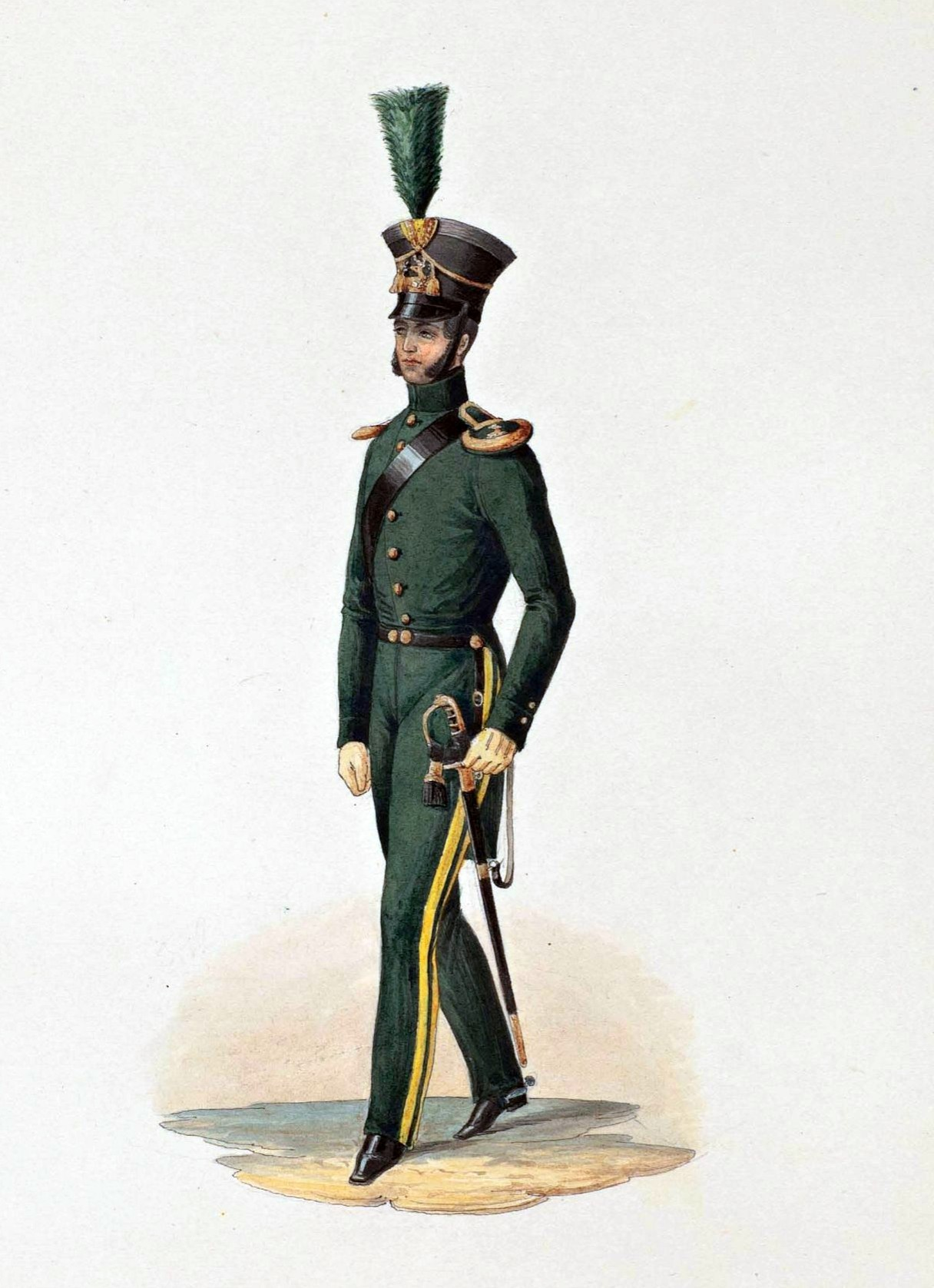 Hovjägare vid Karl XIV Johans hov, ca 1844. Litografi ur verket Konung Carl XIV Johans hov och ordens costumer (1844) av Adolf Ulrik Schützercrantz.